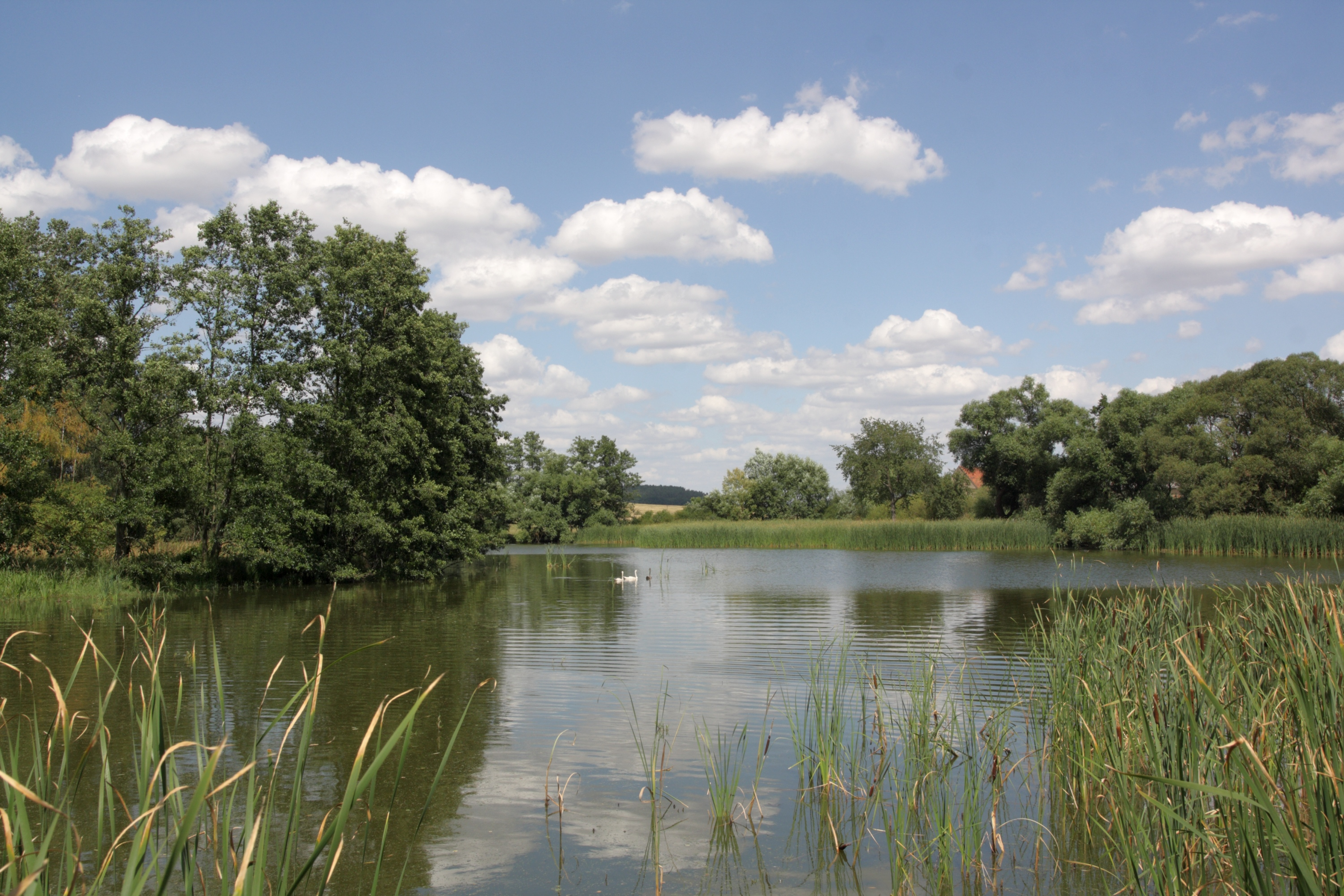 Mezholezy (dříve okres Horšovský Týn) - Mezholezský rybník od jihu.